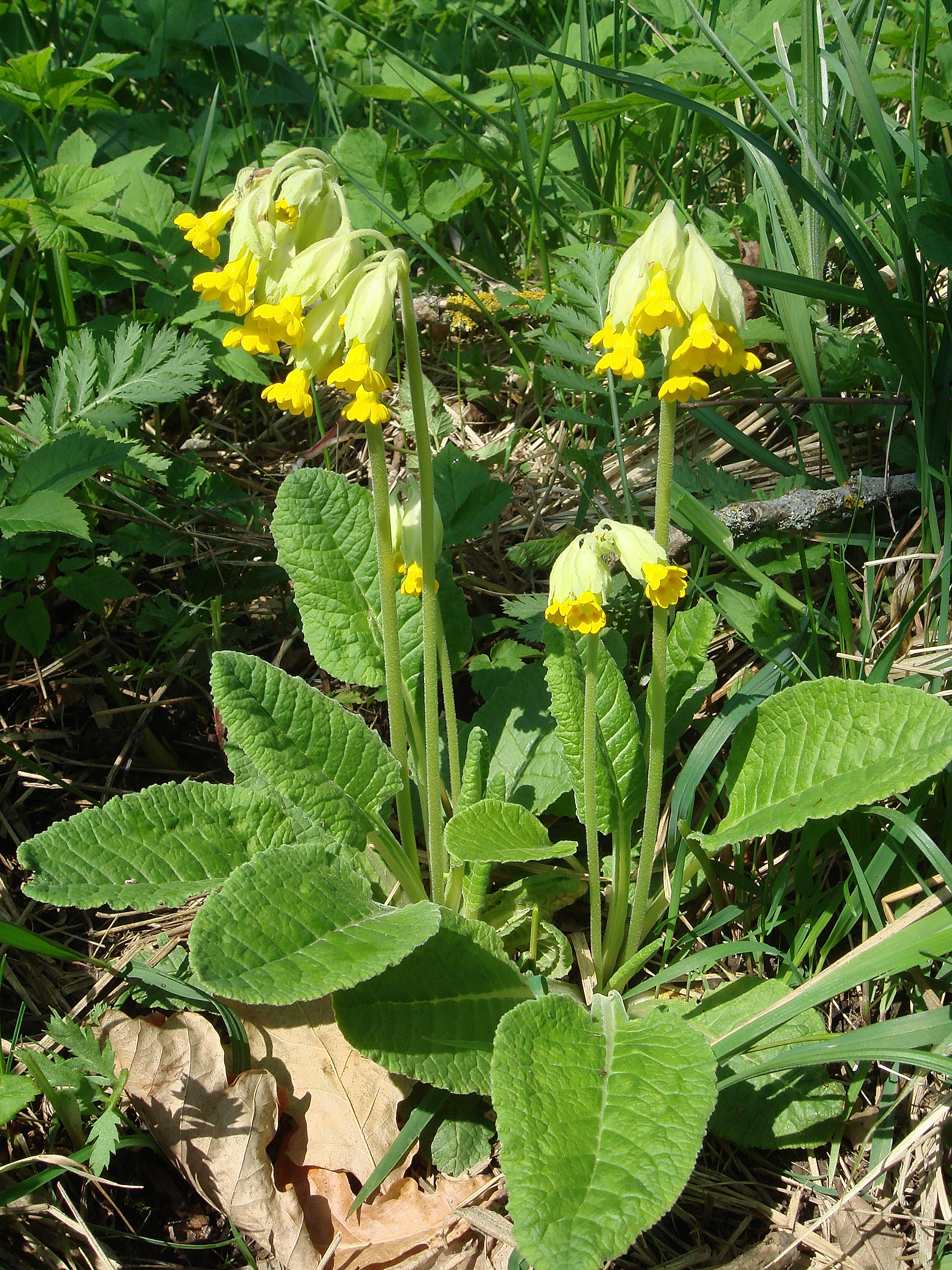 Primula veris.L (Gaiļbiksīte) Photo shot in Latvia